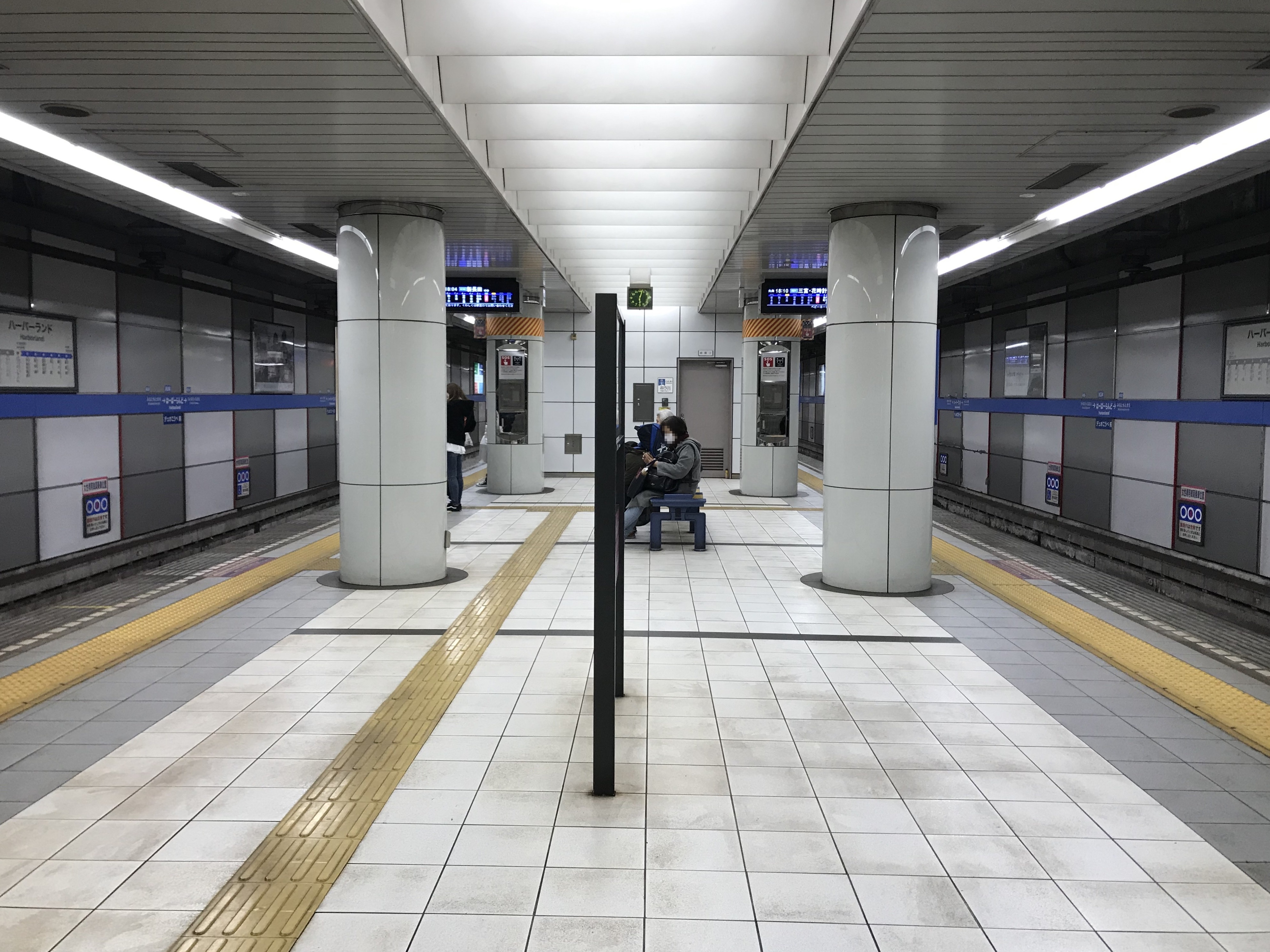 ハーバーランド駅のホーム(奥は中央市場前方面)